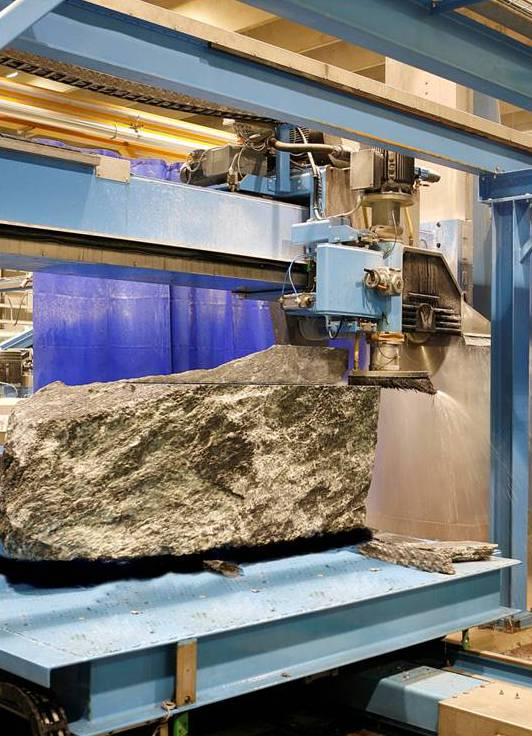 Процесс обработки камня Туликиви